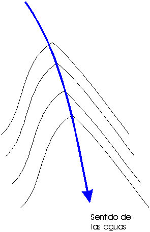 Esquema de las curvas de nivel en un valle.